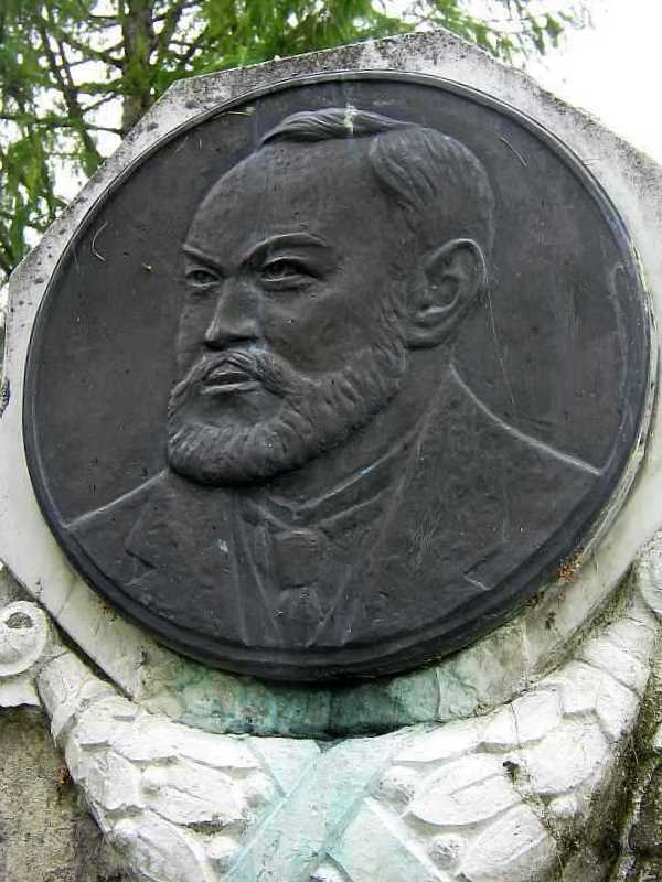 Chugaev_tomb_medalion, near Pavlo-Obnorsky monastery in Vologda oblast